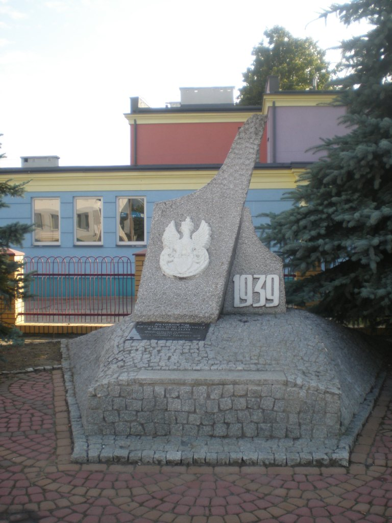 Pomnik ku czci żołnierzy 71 pp poległych we wrześniu 1939 r. Pomnik odsłonięto w Zambrowie w 1982 r., w 2005 r. pomnik odnowiono i przeniesiono na obecne miejsce (ul. kard. S. Wyszyńskiego).